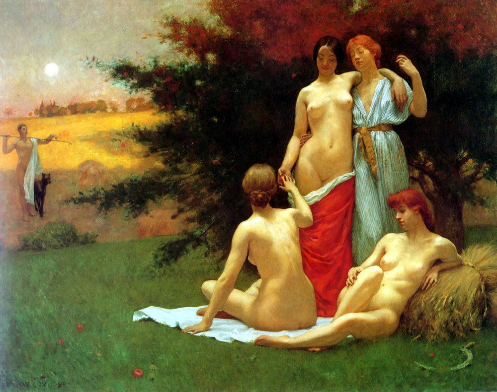 An Eclogue